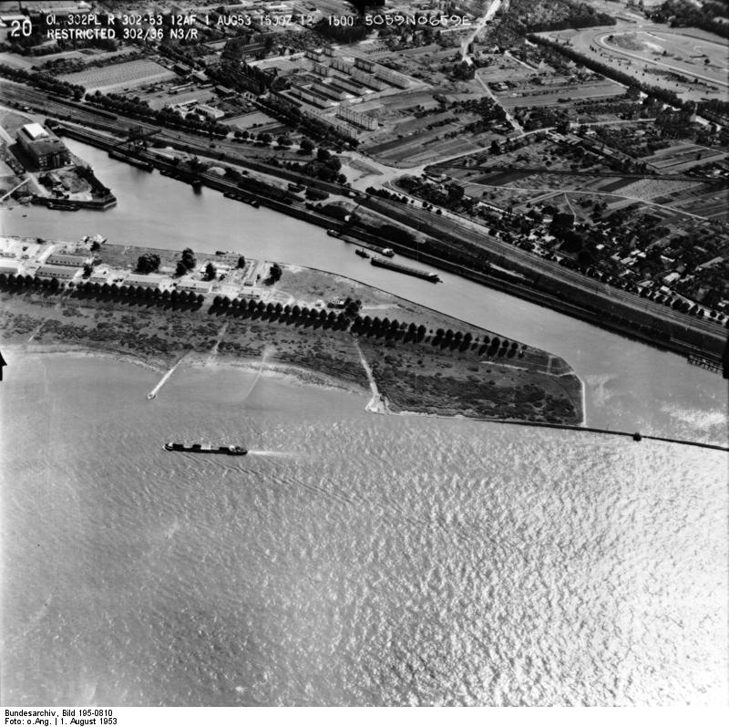 Rheinbefliegung der Alliierten 1953